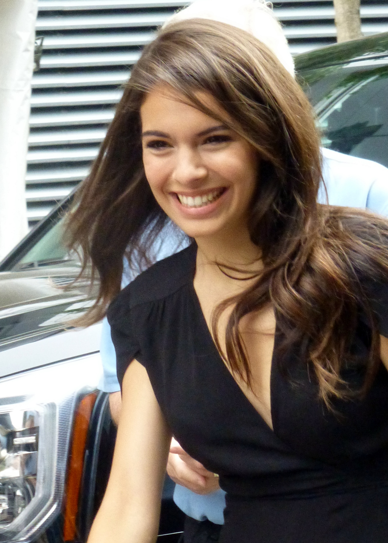 Claudia Traisac at Escobar Paradise Lost press conference, 2014 Toronto Film Festival